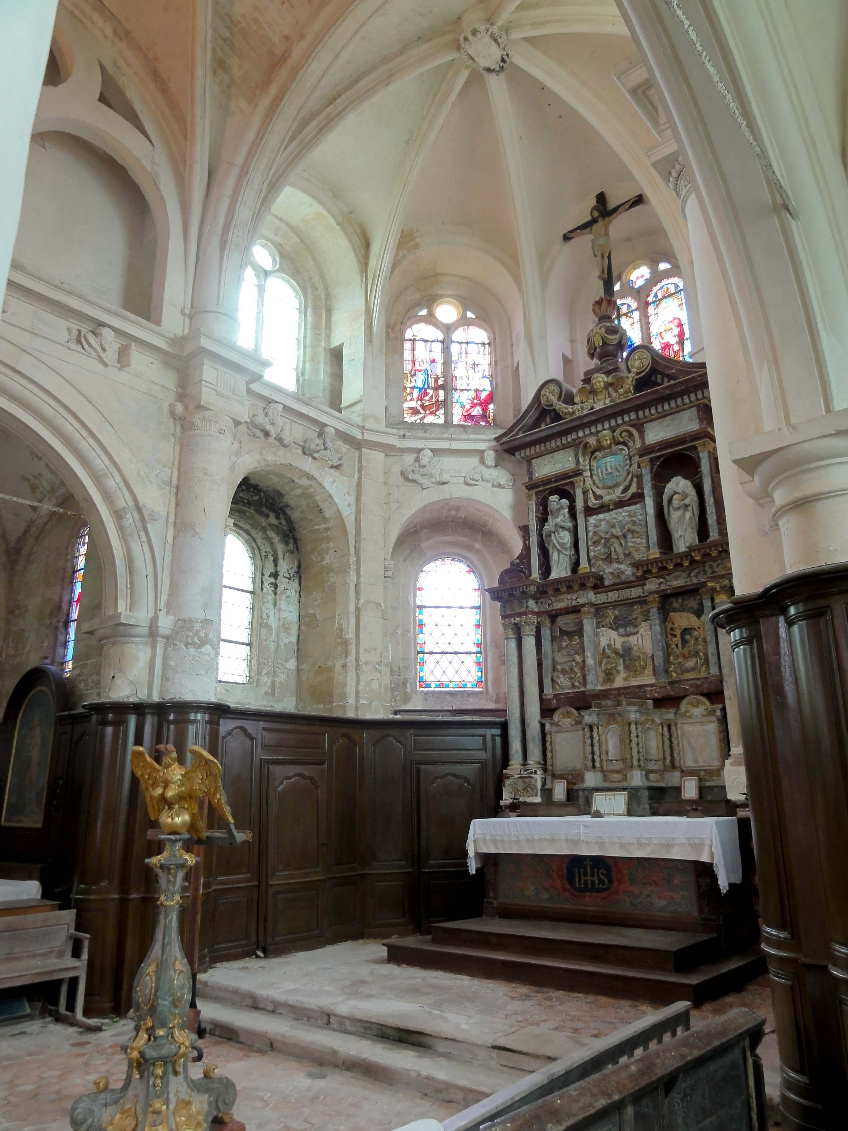 Intérieur de l'église (voir titre).